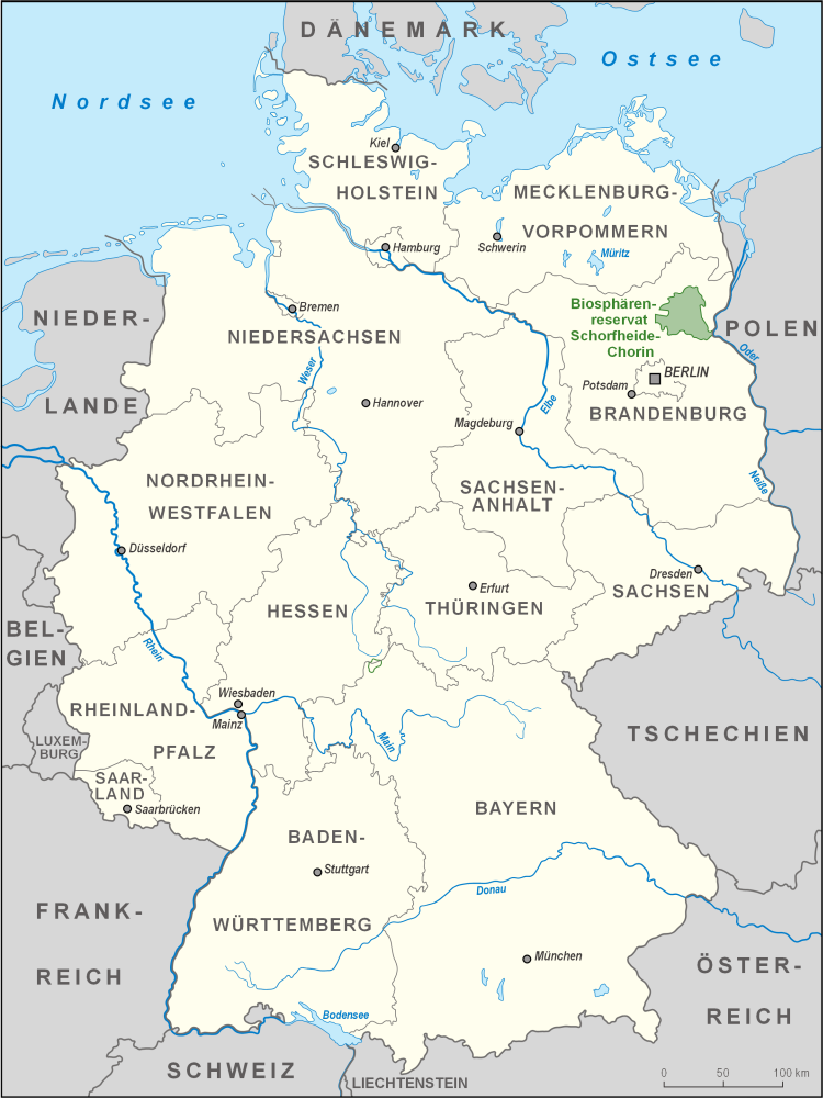 Karte des Biosphärenreservates Schorfheide-Chorin in Deutschland